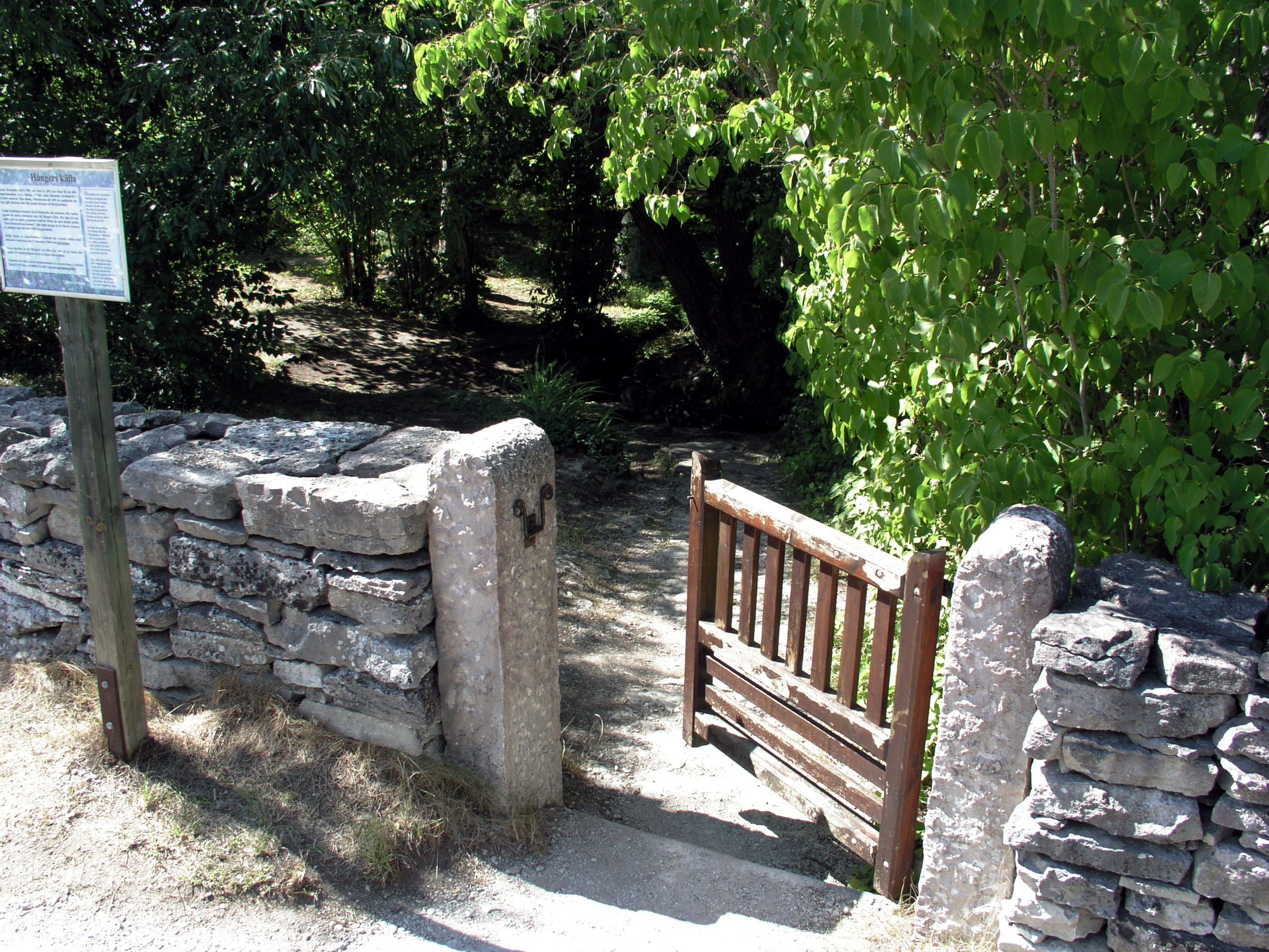 Hångers källa, cold water well, Lärbro, Gotland, Sweden